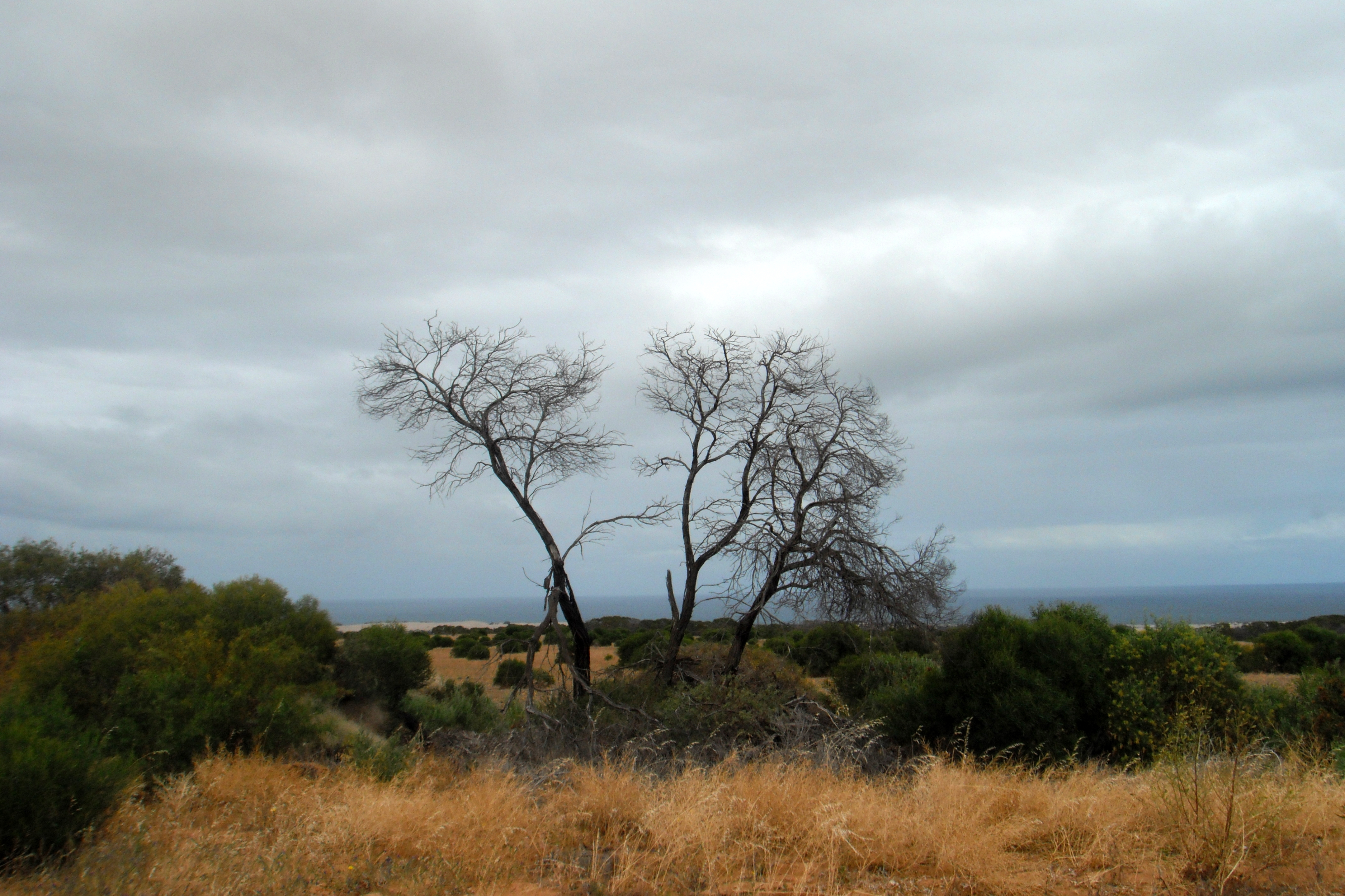 Bush in Western Australia